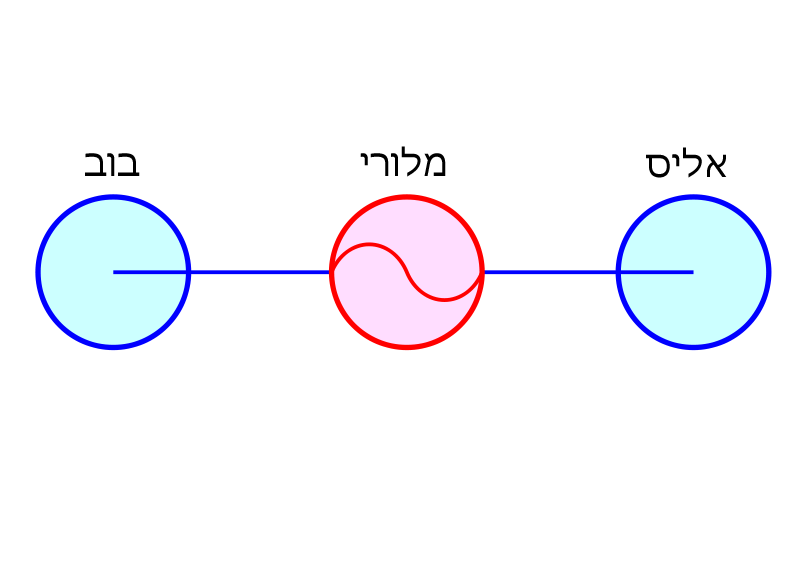 התקפת אדם באמצע